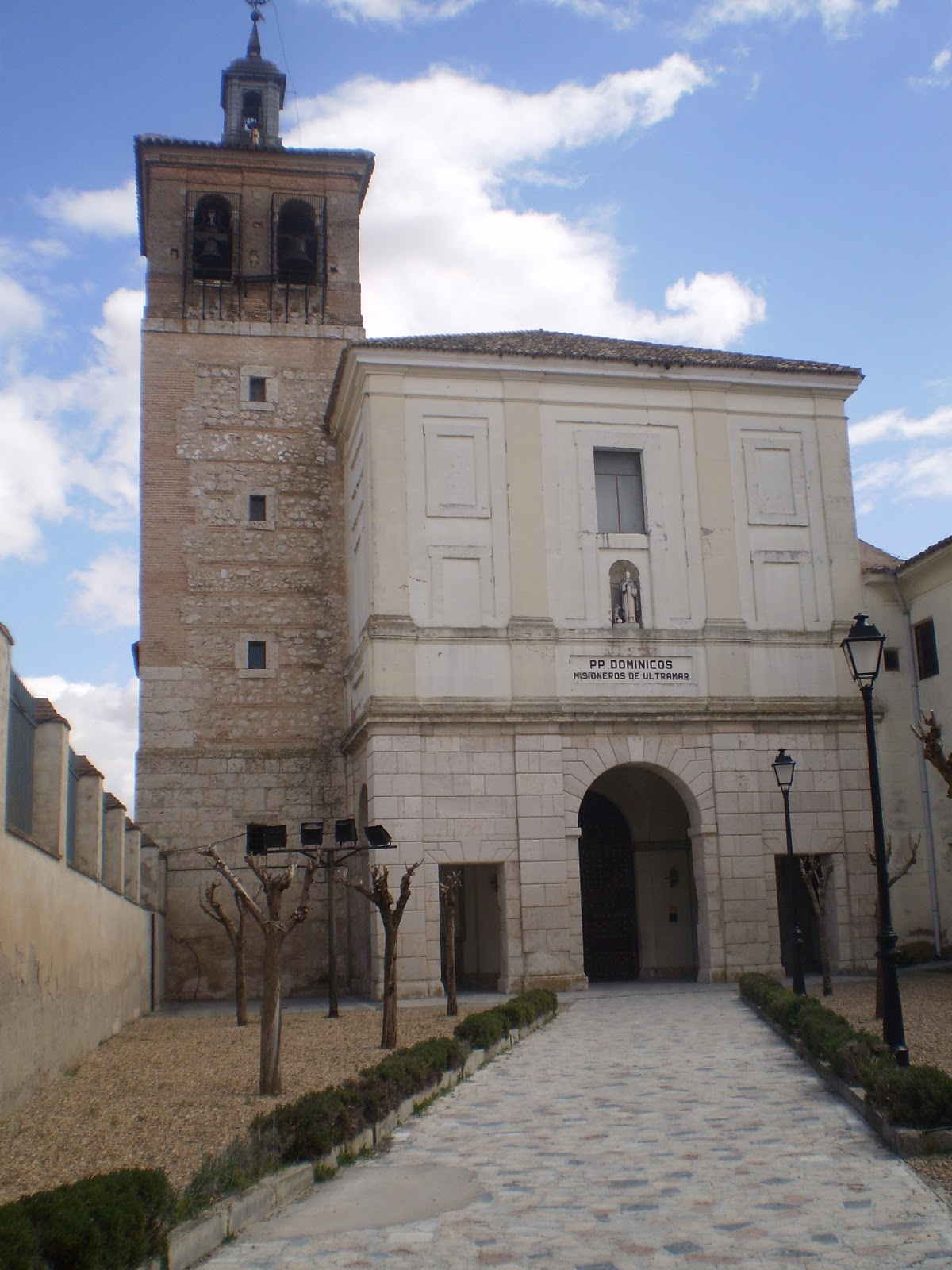 Convento de Santo Domingo de Guzmán en Ocaña (Toledo).